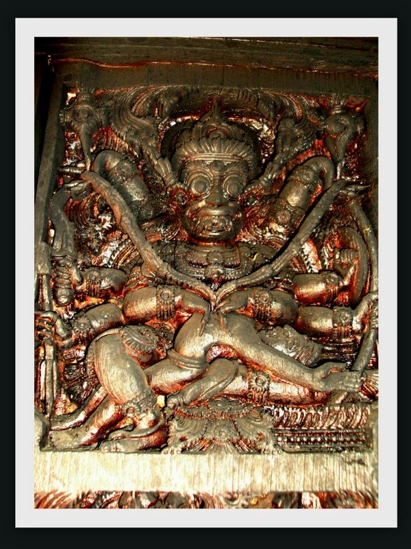 വാഴപ്പള്ളിയിലെ നരസിംഹ ശില്പം